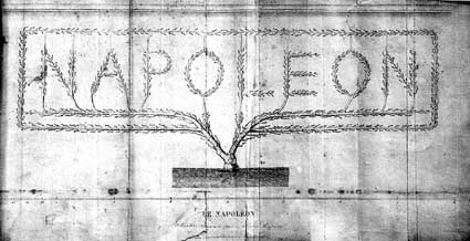 Schiftzug Napoleon aus Spalierbäumen, Baumschule Alexis Lepere